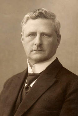 Karl Wilhelm Wefring